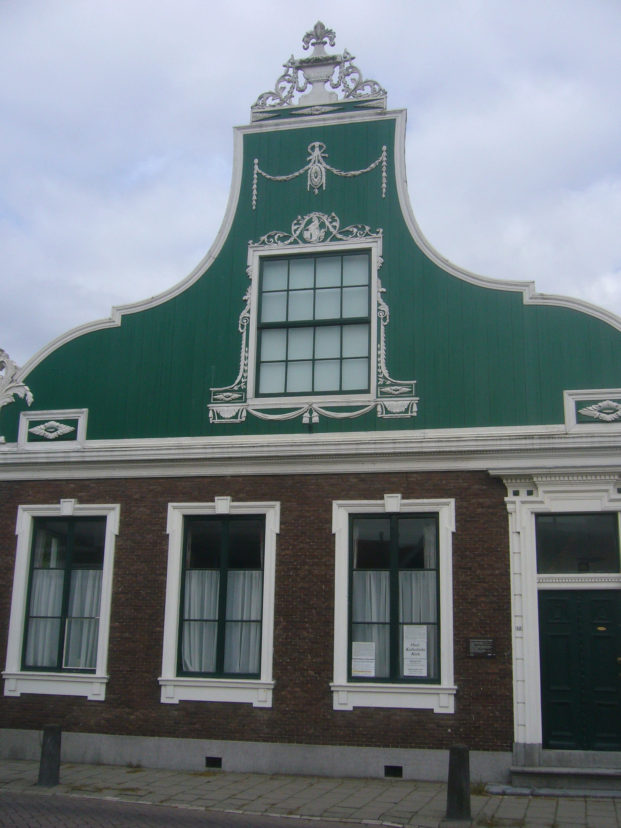 Oud Katholieke schuilkerk H.Nicolaus, pastorie Noorderhoofdstraat 131 Krommenie